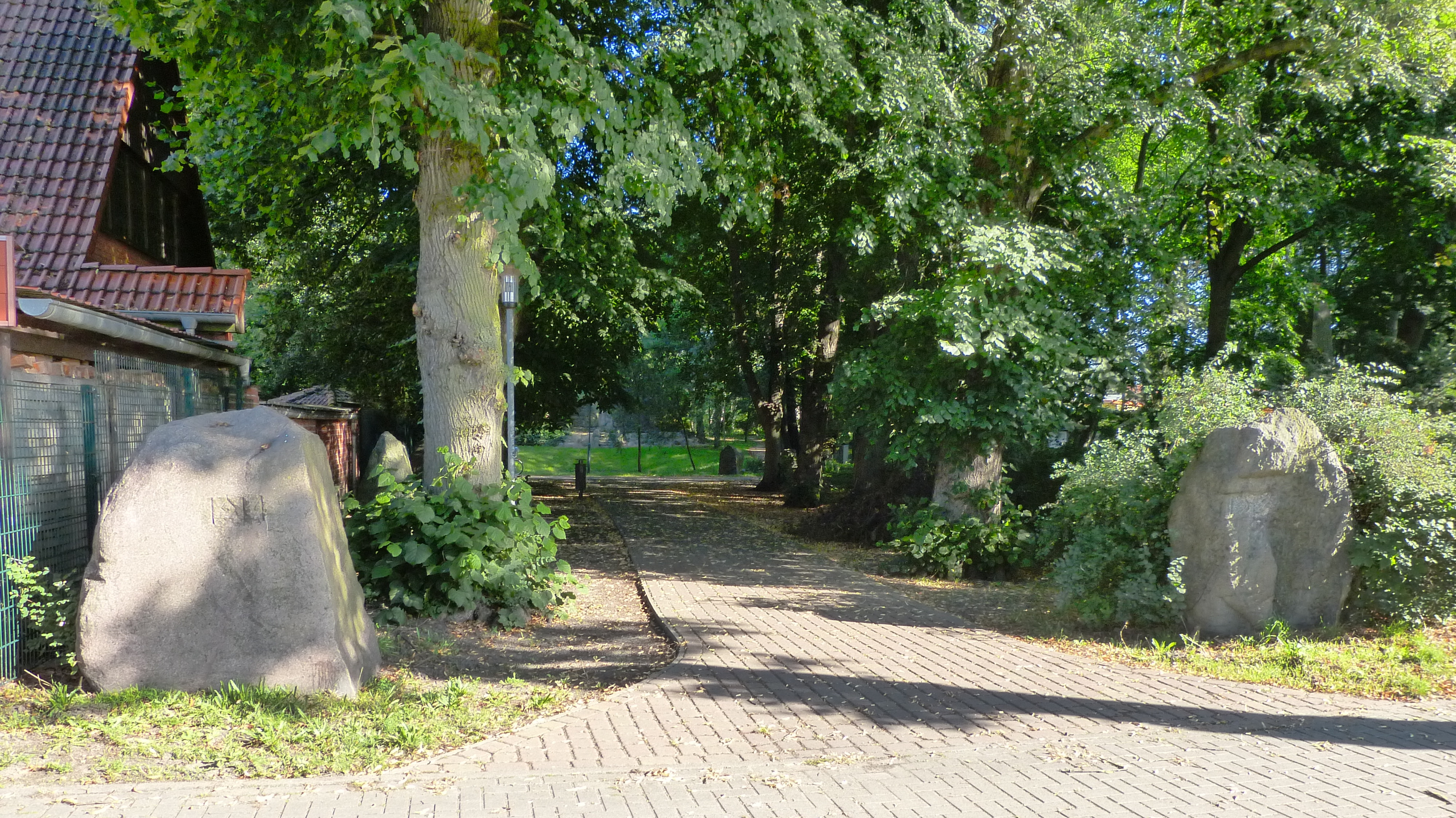 Loitz, Haupteingang des Gülzow-Parks